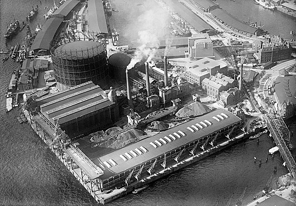 Gasometer Hamburg-Grasbrook